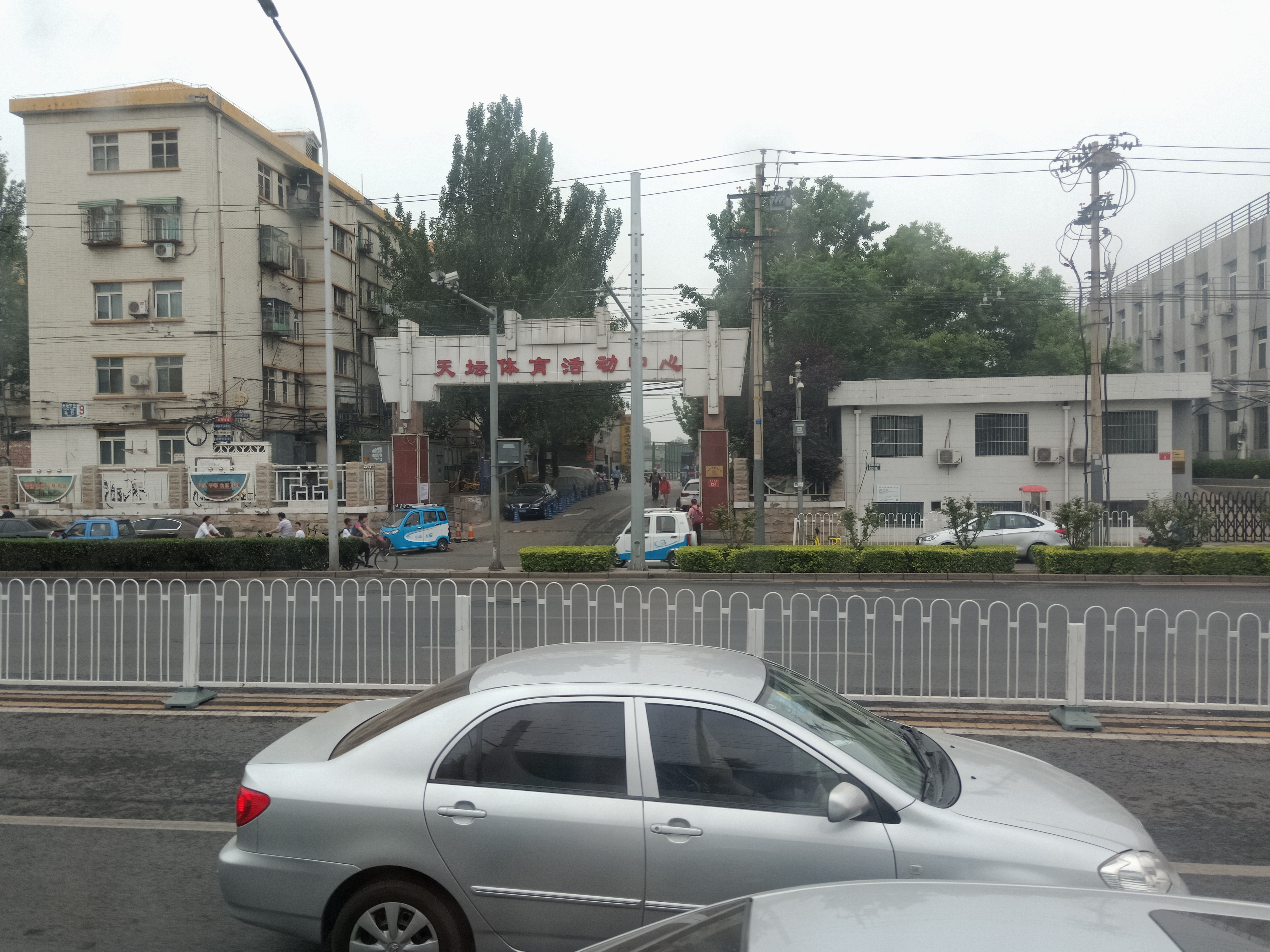 粵語: 天壇體育活動中心